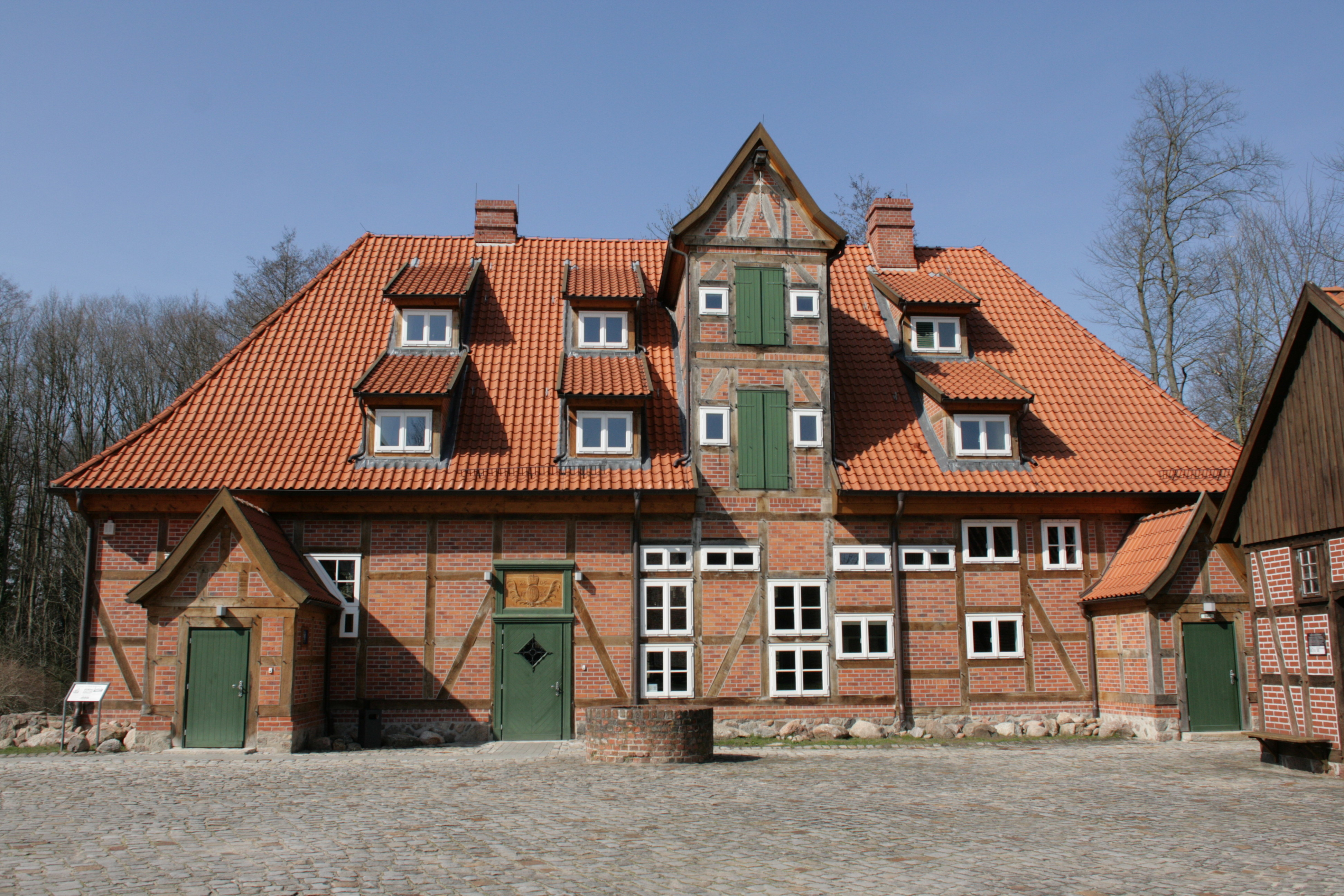 Bodenteicher Brauhaus, Burg Bodenteich, Burgstraße in Bad Bodenteich